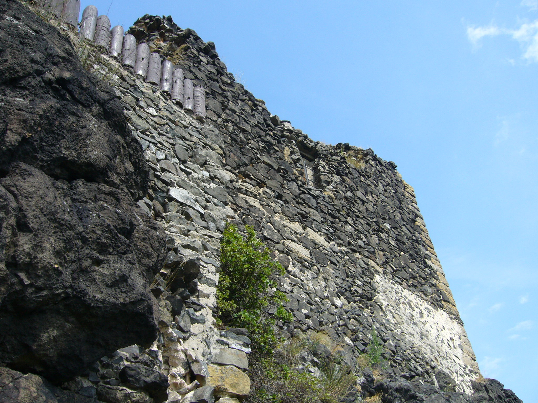 Obytná budova na vrcholové skále, Hrad Starý Berštejn, Vrchovany.